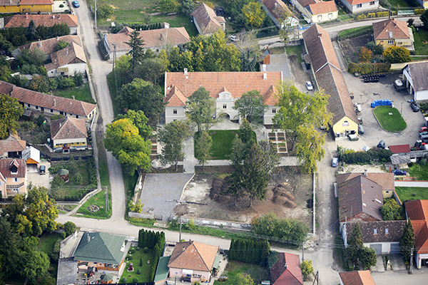 Dessewffy-kastély - Helia-D Herba-kastély, légi felvétel